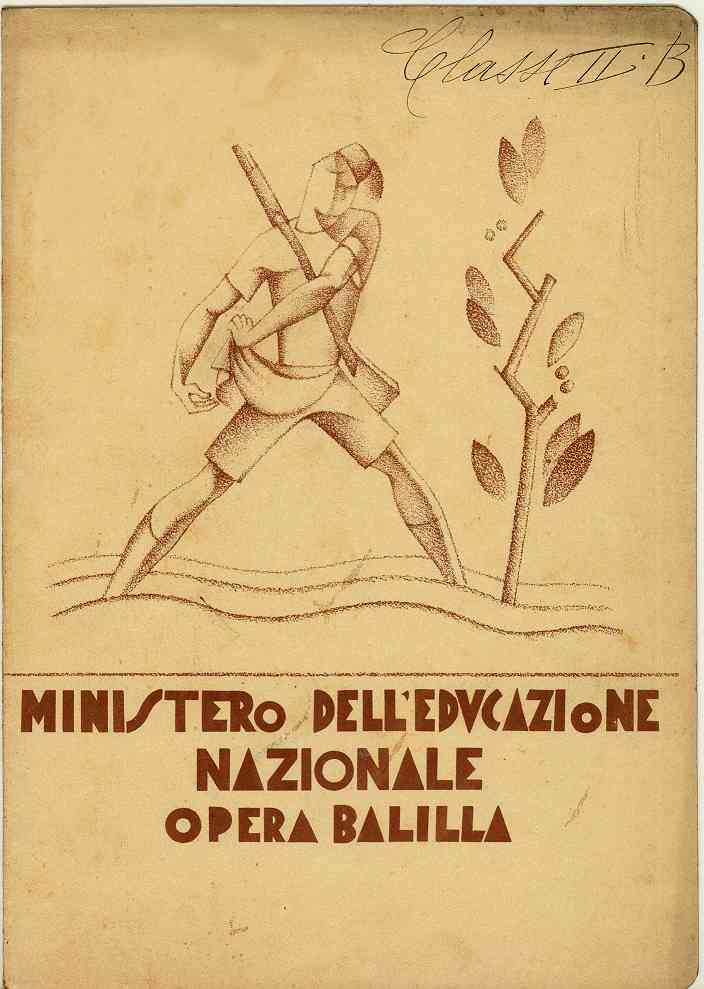 Opera Balilla Anno XII - Ministero dell'Educazione Nazionale Opera Balilla - copertina di pagella di II elementare